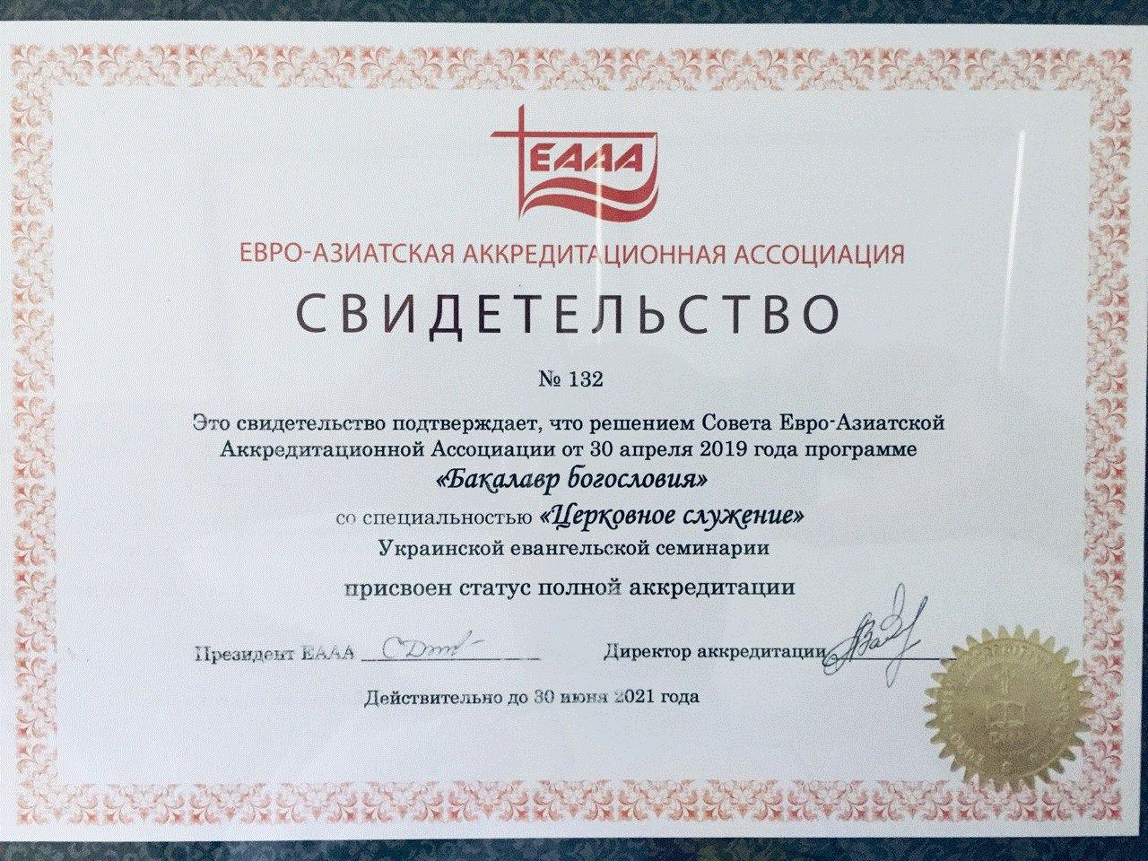 свідоцтво про акредитацію уєс